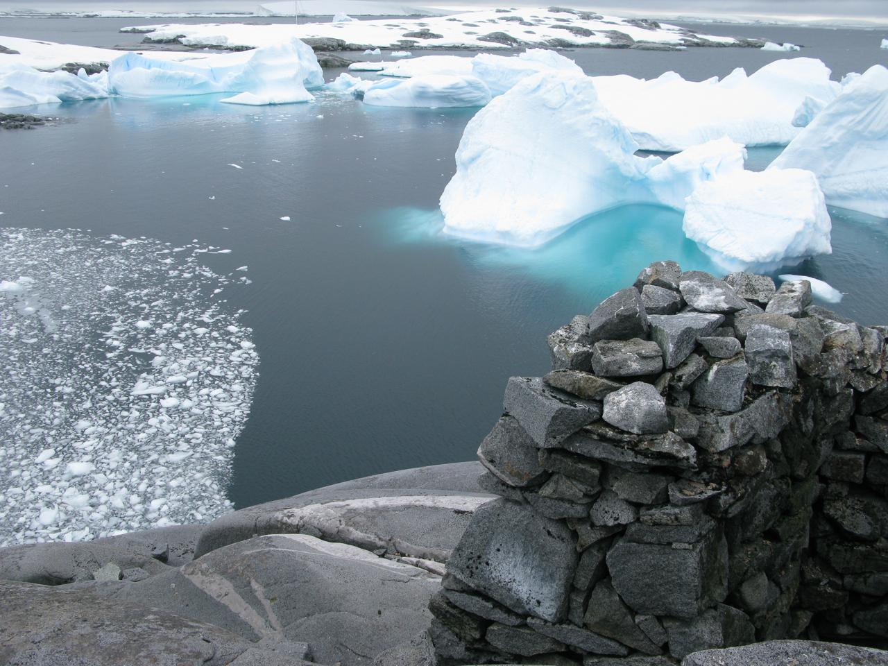 Port Charcot (Antarctique) - vestige